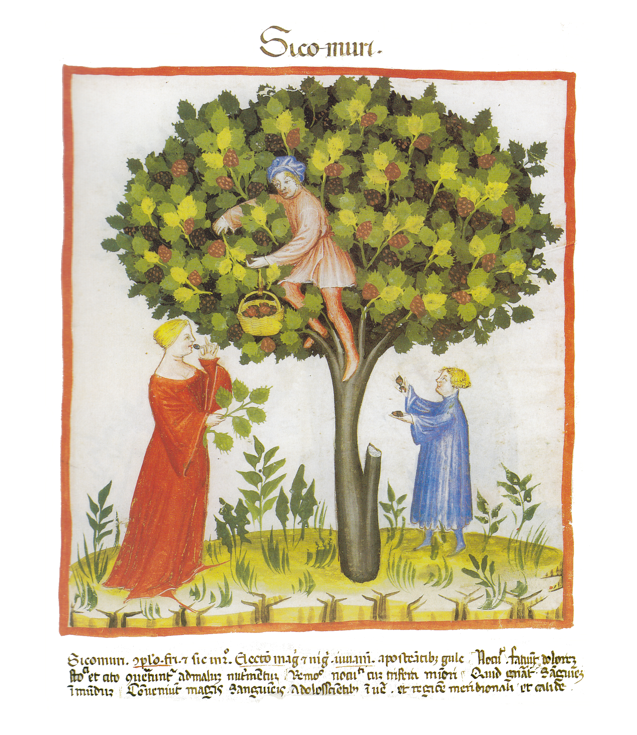 Maulbeerbaum